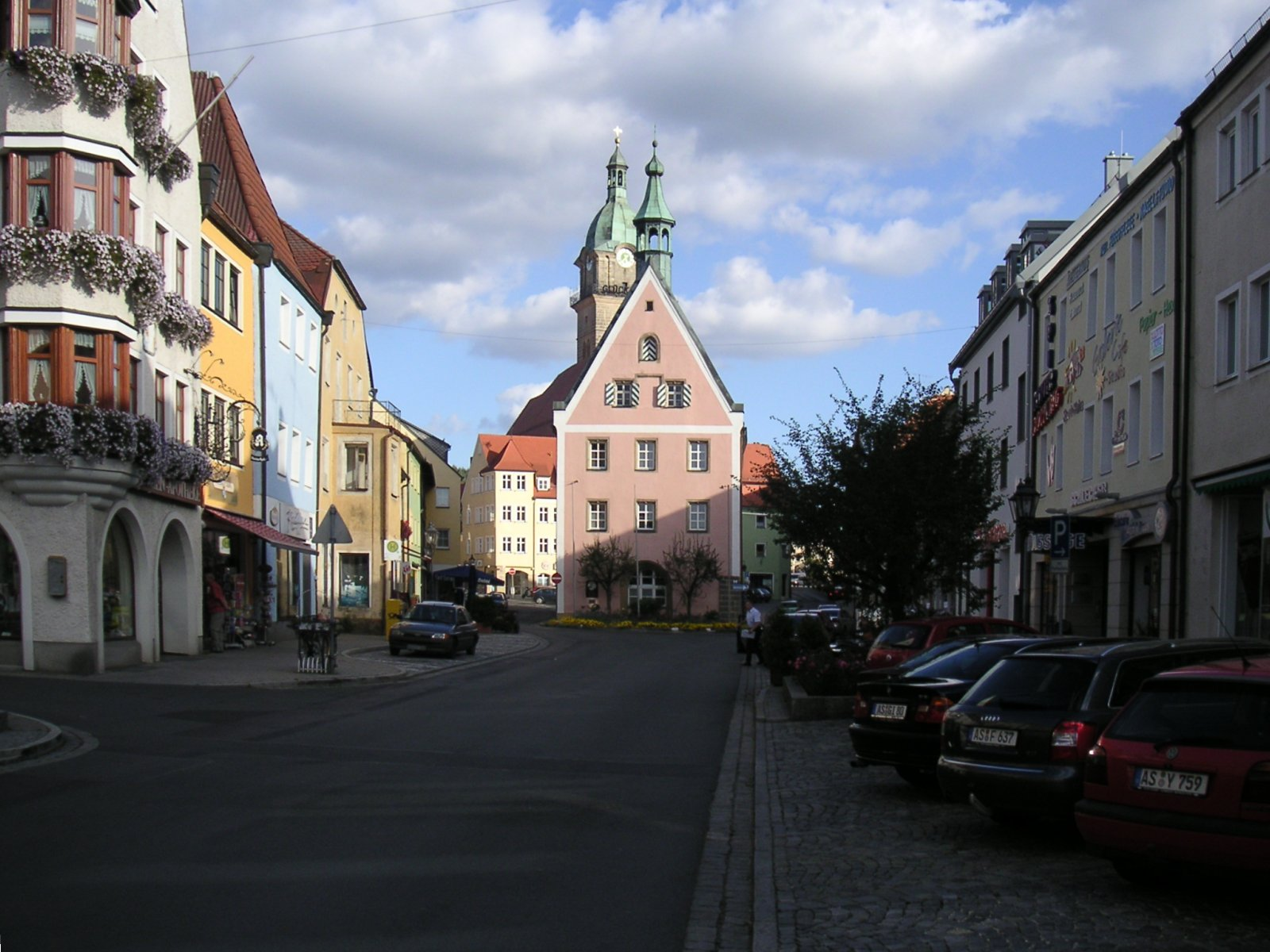 Innenstadt Auerbach/Opf